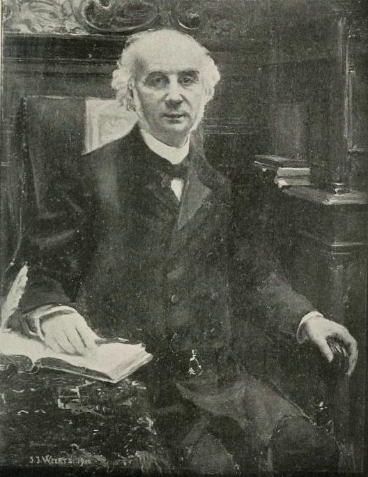 "Portrait de M. Gréard, vice-recteur de l'Université".